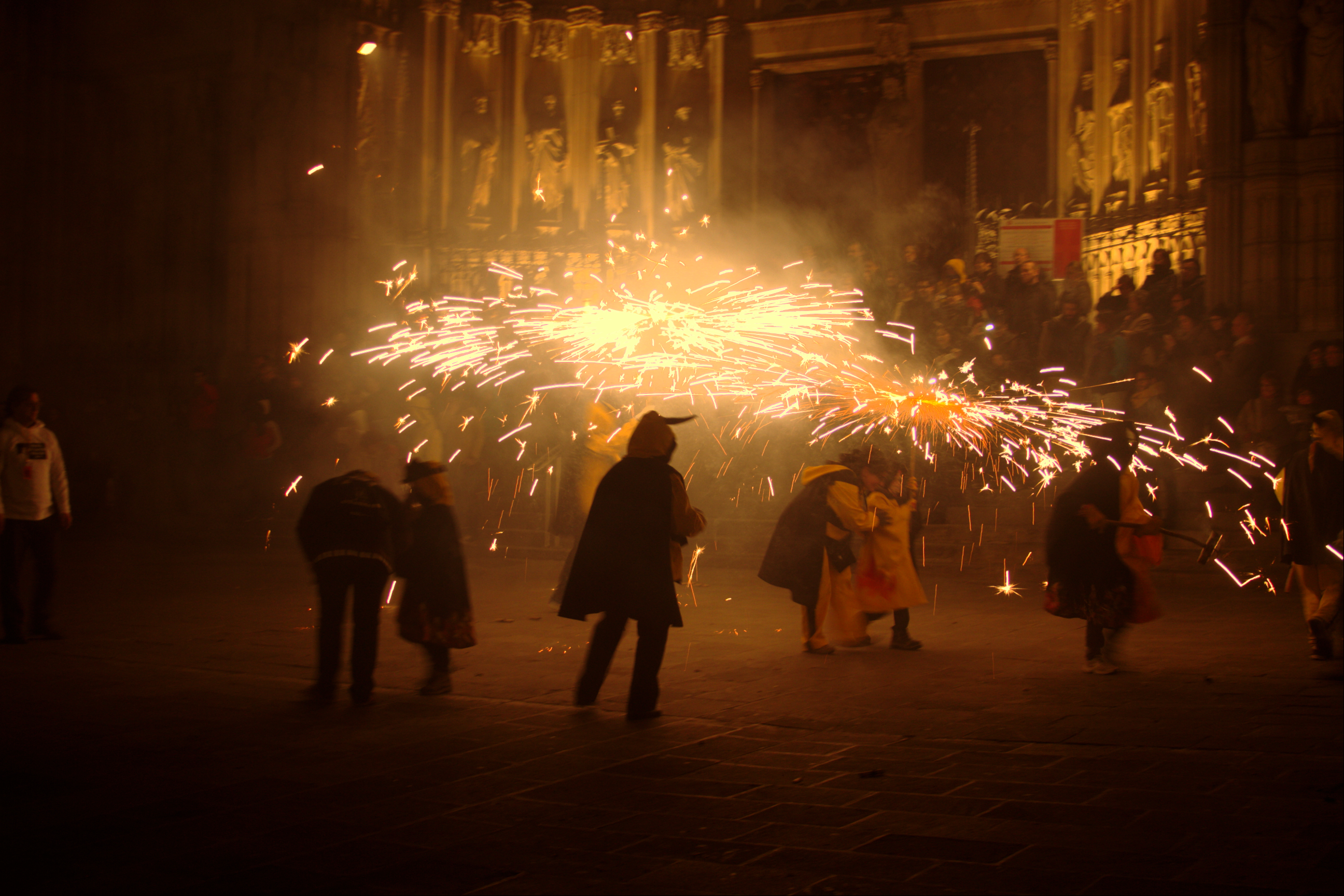 Festa de Santa Eulália em 2014